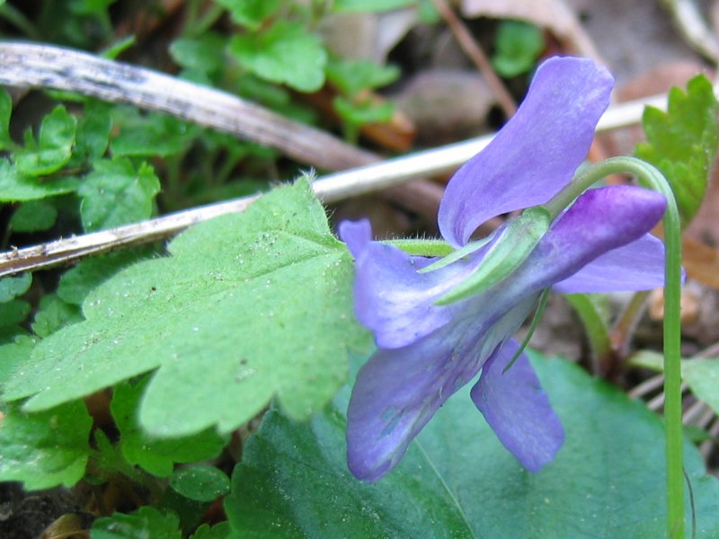 Wald-Veilchen Viola reichenbachiana, Nähe Rostock